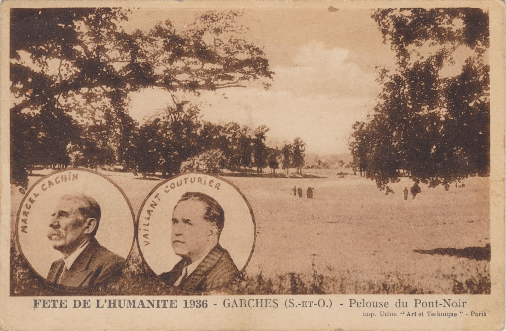 Carte de soutien à l'Humanité vendue par les Comités de défense de l'Humanité (CDH). Les dirigeants emblématiques du journal figurent en médaillons : Marcel Cachin, directeur, et Paul Vaillant-Couturier, rédacteur en chef. La fête se déroule à Garches, alors en Seine-et-Oise, le dimanche 30 août 1936.